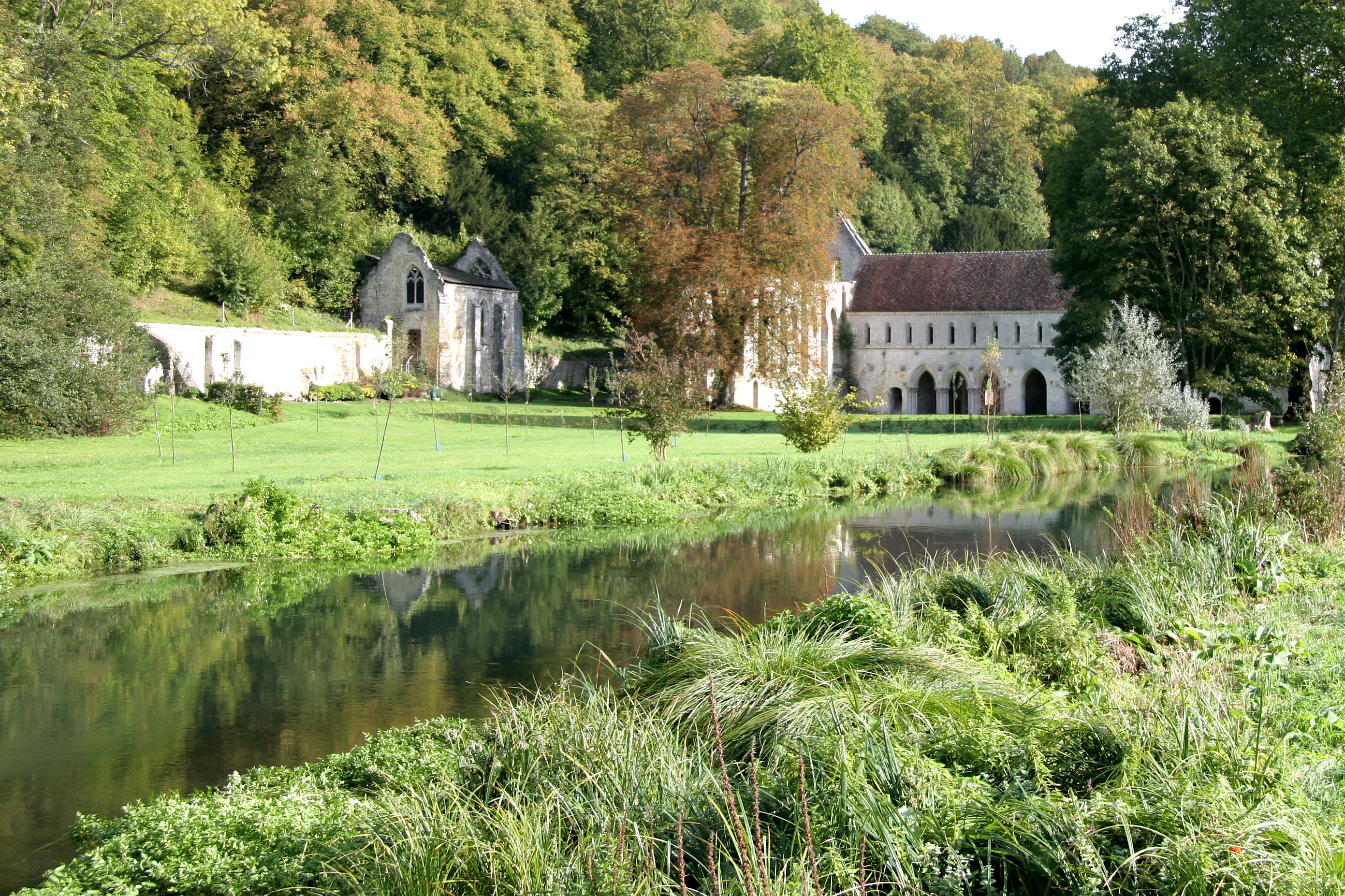 Abbaye de Fontaine-Guérard, Eure, Normandie, France